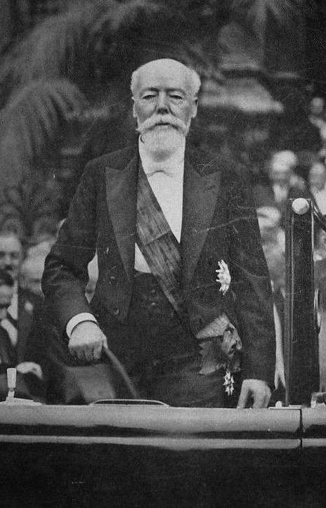 Paul Doumer le jour de son investiture à la présidence de la République, après sa réception à l'hôtel de ville de Paris.